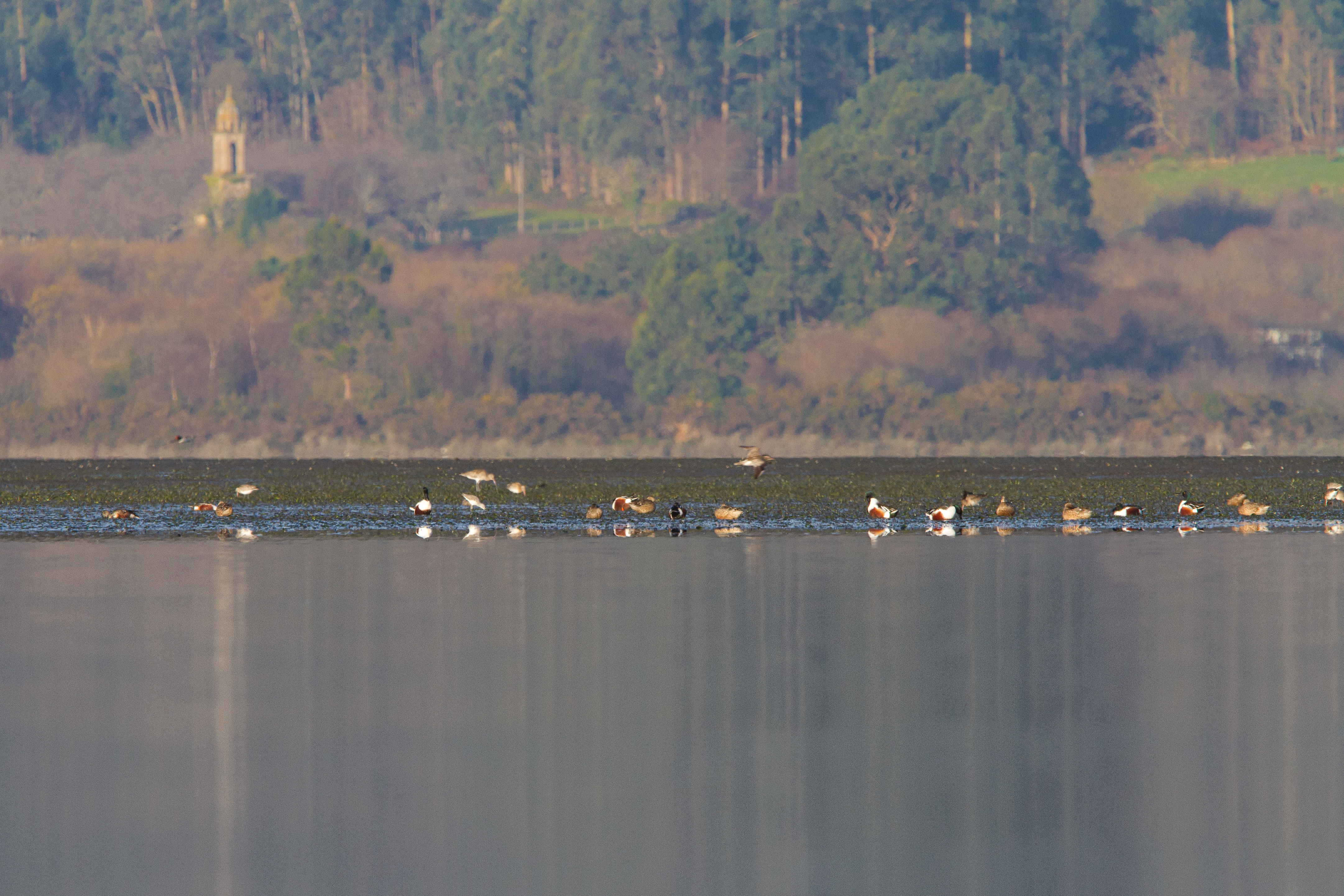 Ortigueira-Mera Varias especies de anátidas y limícolas alimentándose en el intermareal de la Ría de Ortigueira, con la iglesia abandonada de Feas al fondo This is a photography of a Site of Community Importance in Spain with the ID: ES1110001. Natura2000 entry, EEA entry